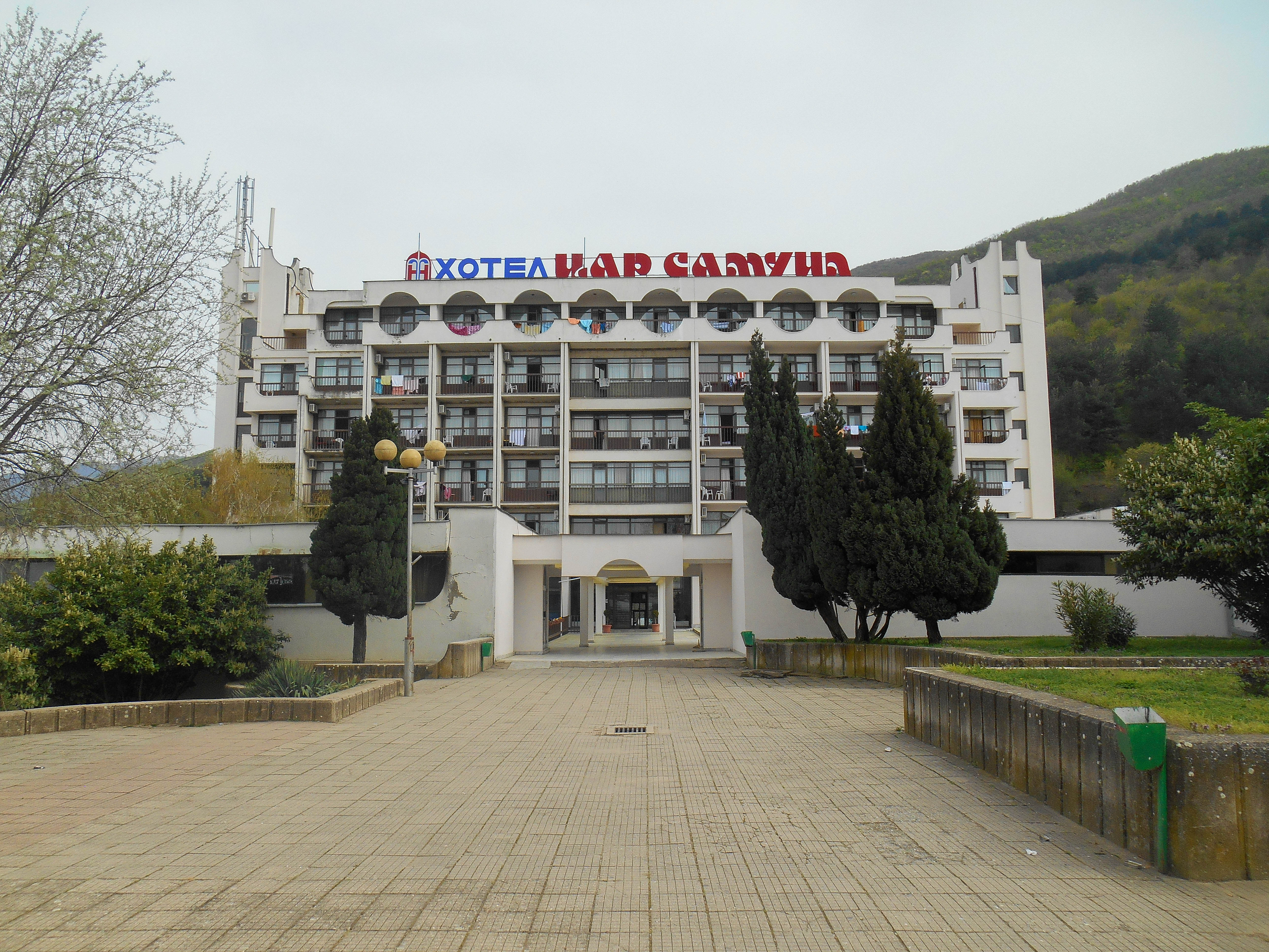 Хотел Цар Самоил